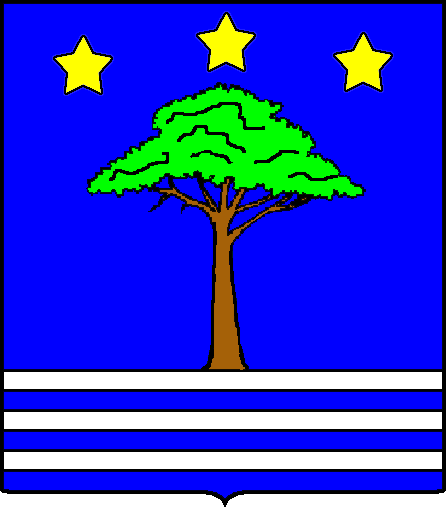 blason de la famille Debono